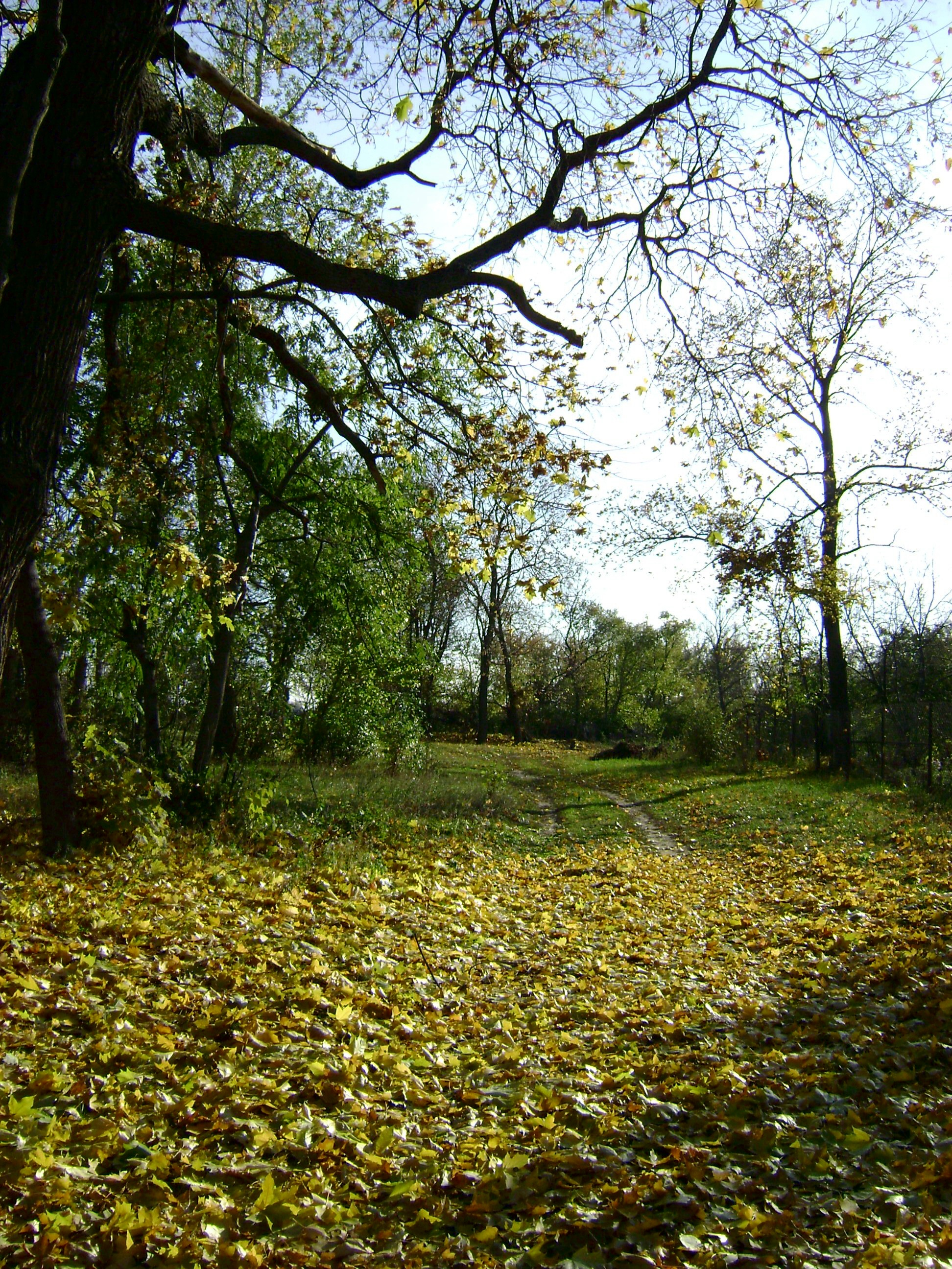 «Барский сад» осенью в Горожанке (Рамонский район, Воронежская обл., Россия)